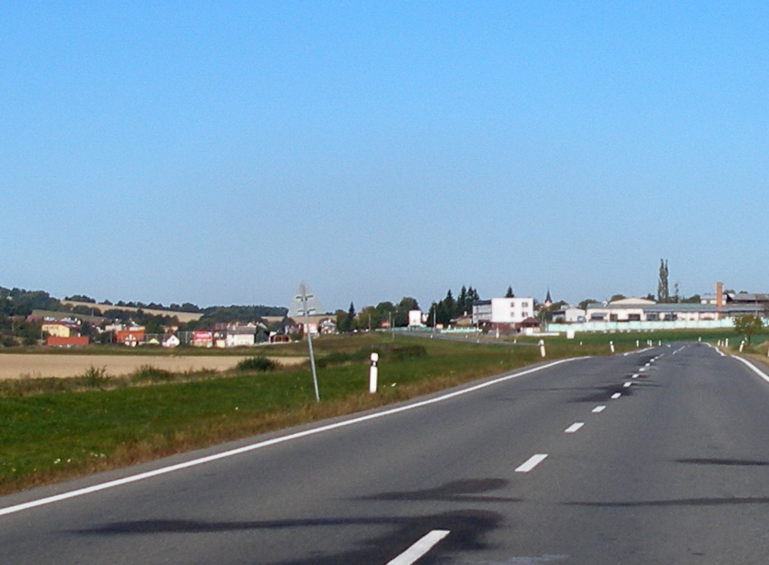 Obec Kobyly okres Bardejov.